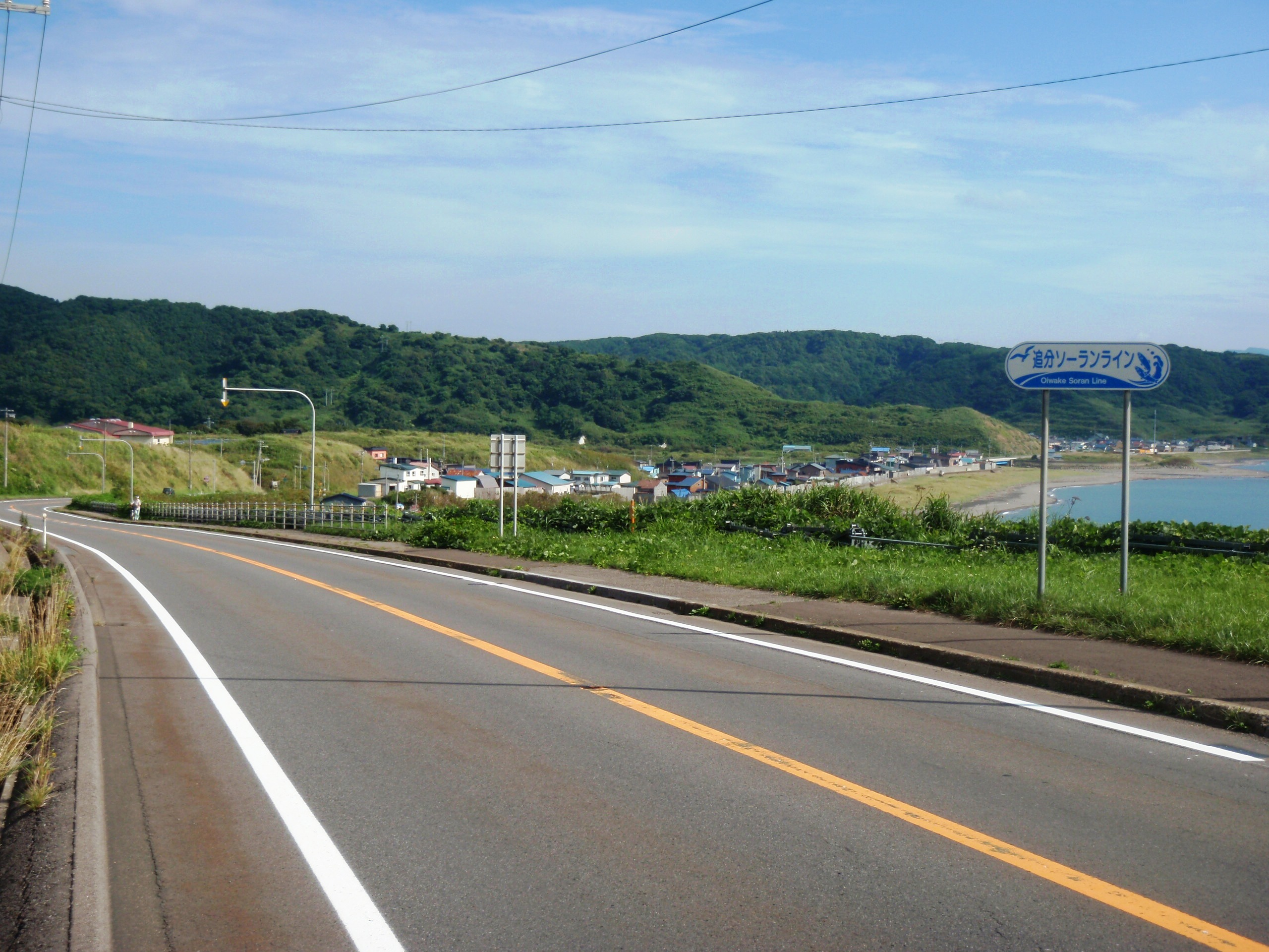 国道277、229号重複区間、追分ソーランライン。八雲町熊石見日の見市川付近から鮎川海岸方面を写す。